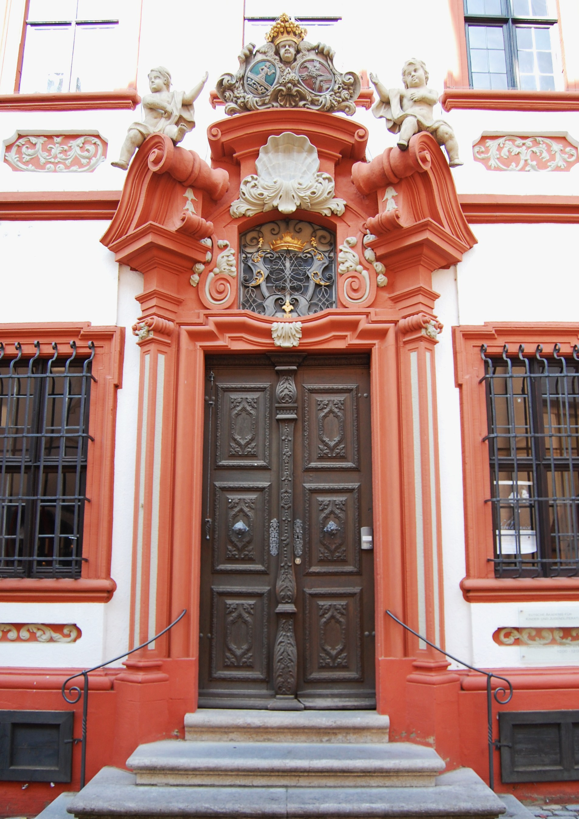 Eingang ins Schelfenhaus in Volkach (1719-1729)